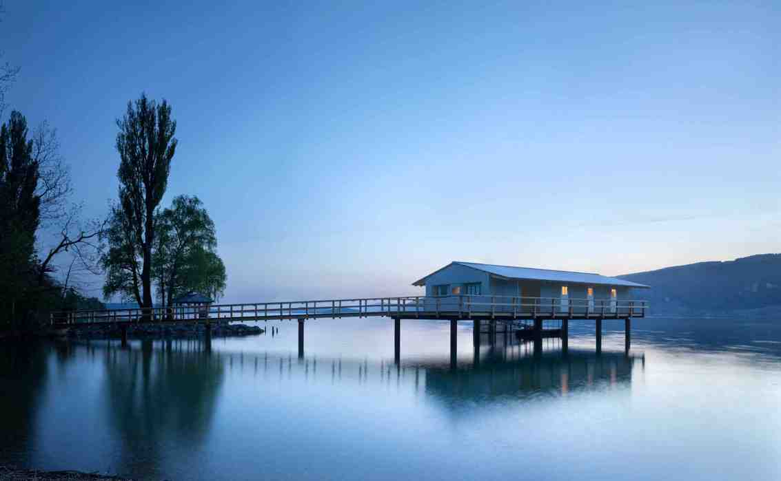 Tauchplattform